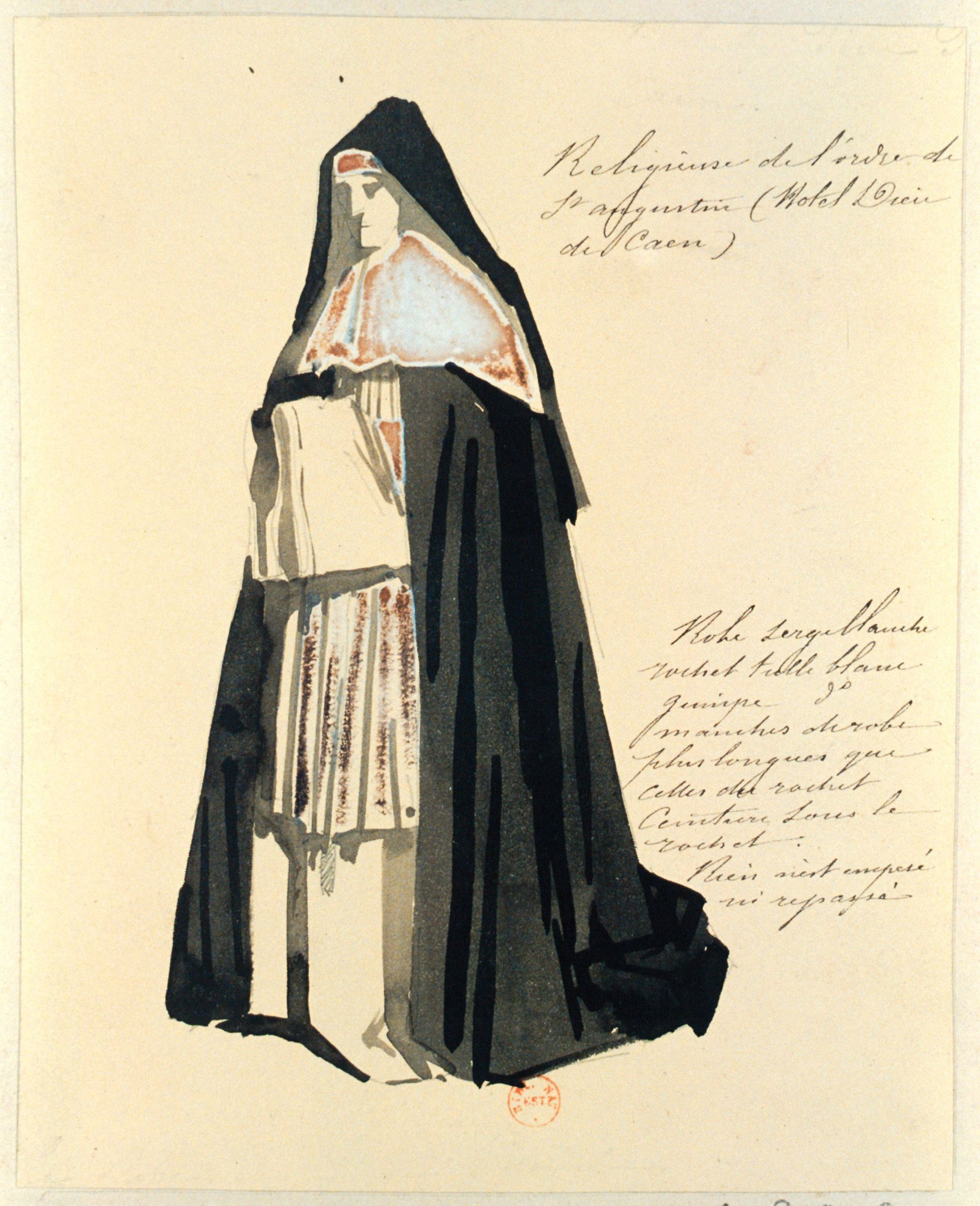 Religieuse de l'ordre de Saint-Augustin de l'Hôtel-Dieu de Caen. Lavis à l'encre de Chine rehaussé de gouache ; 19 x 15,1 cm. From Hippolyte Destailleur (1822-1893), collectionneur.